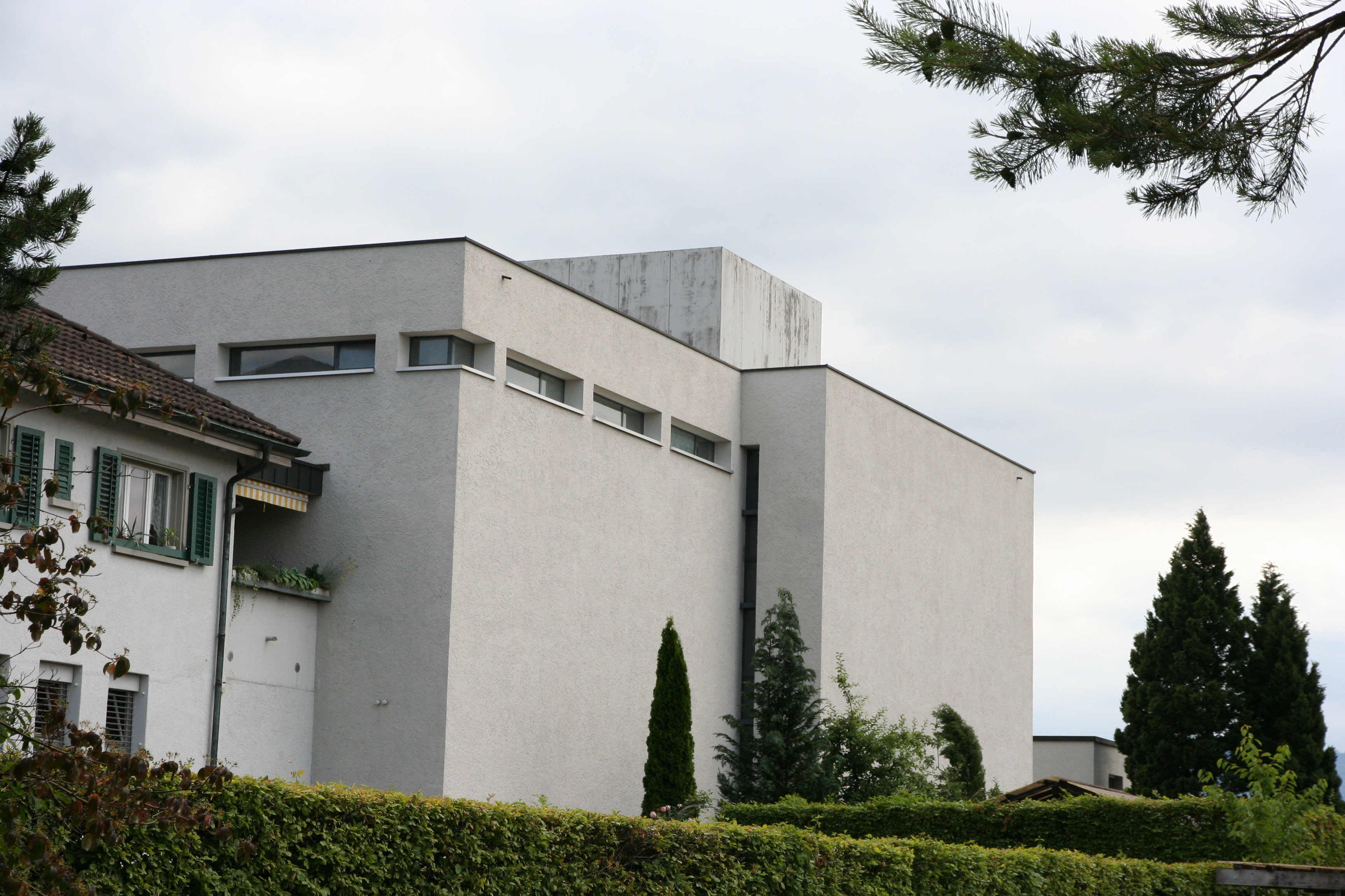 Römisch-katholische Pfarrkirche Dreifaltigkeit Rüti ZH, Aussenansicht von Westen